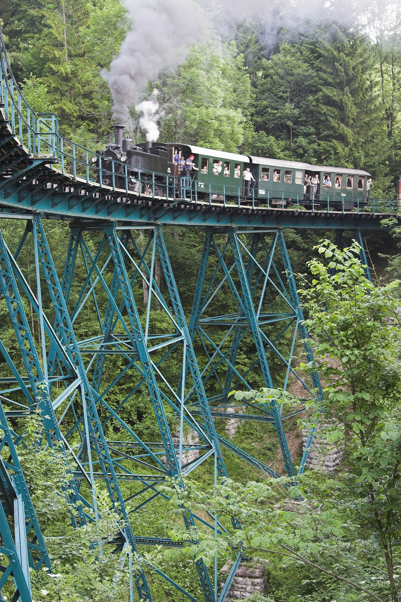 en: Steyrtalbahn engine No. 2 (ÖBB 298.102) as a special guest on the Ybbstahlbahn Bergstrecke heritage railway. The train is passing the Hühnernestgraben viaduct, one of two steel trestlework bridges of that narrow gauge line. de: Steyrtalbahn-Lokomotive Nr. 2 (ÖBB 298.102) als Gast auf der Museumsbahn Ybbsthalbahn-Bergstrecke. Der Zug passiert den Hühnernestgraben-Viadukt, eine von zwei stählernen Trestleworkbrücken auf dieser Strecke.